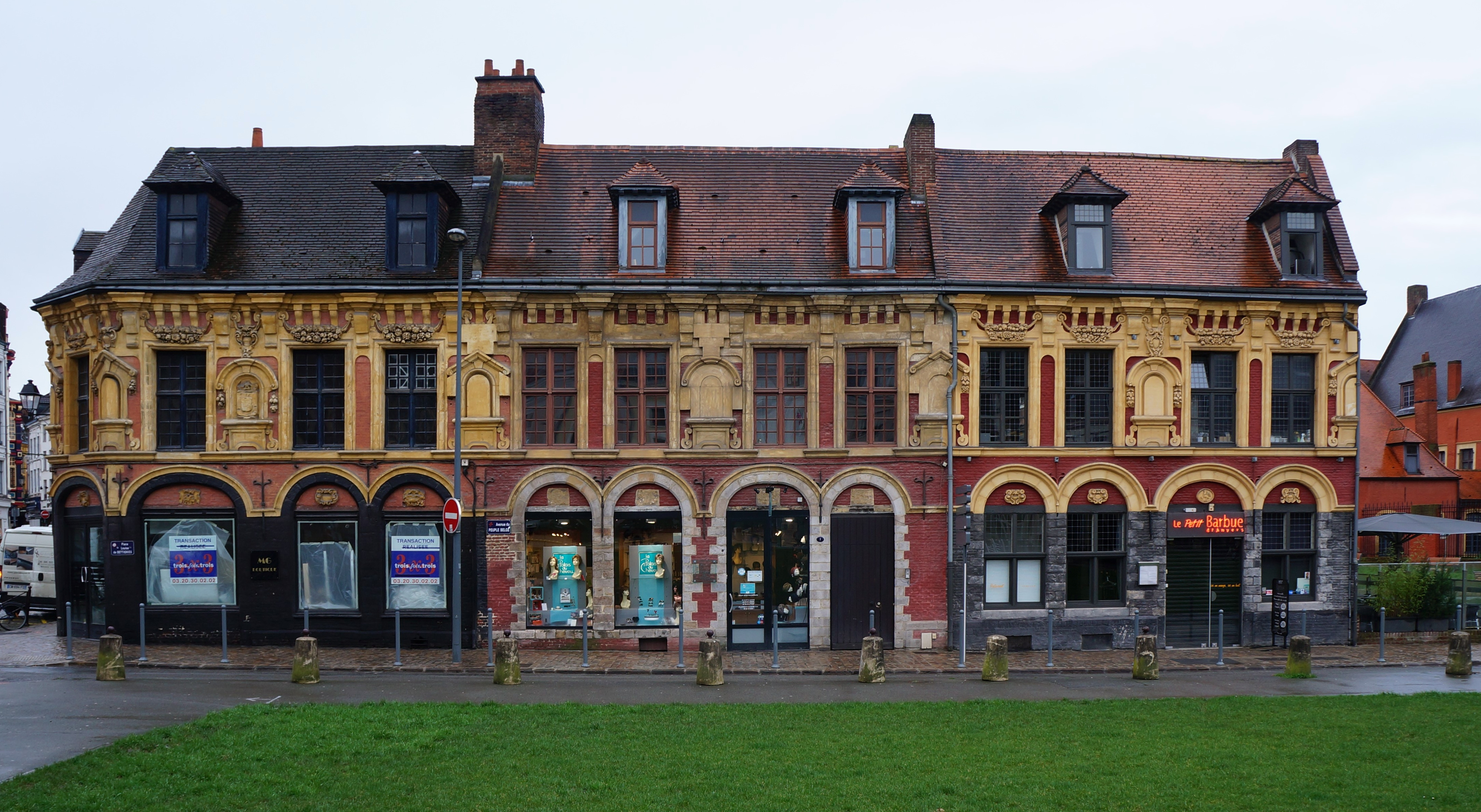 La Maison de Gilles de la Boé, Place Louise-de-Bettignies à Lille Nord (département français)